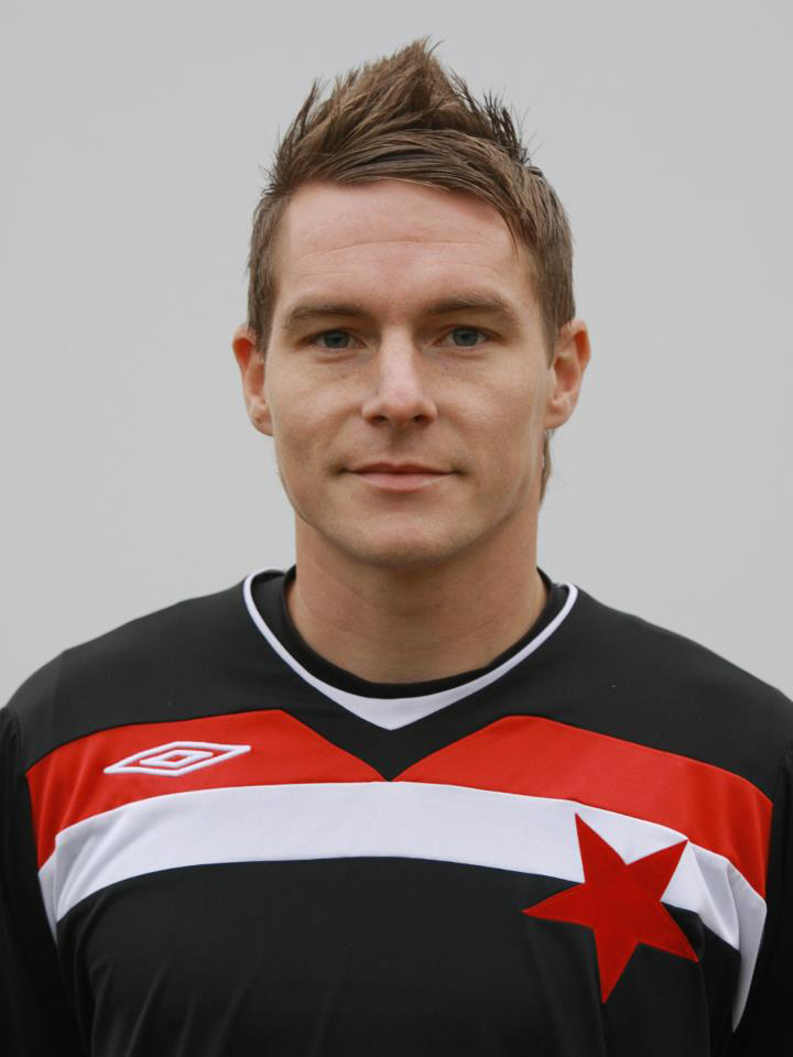 Michal Kovář - MFK Vítkovice